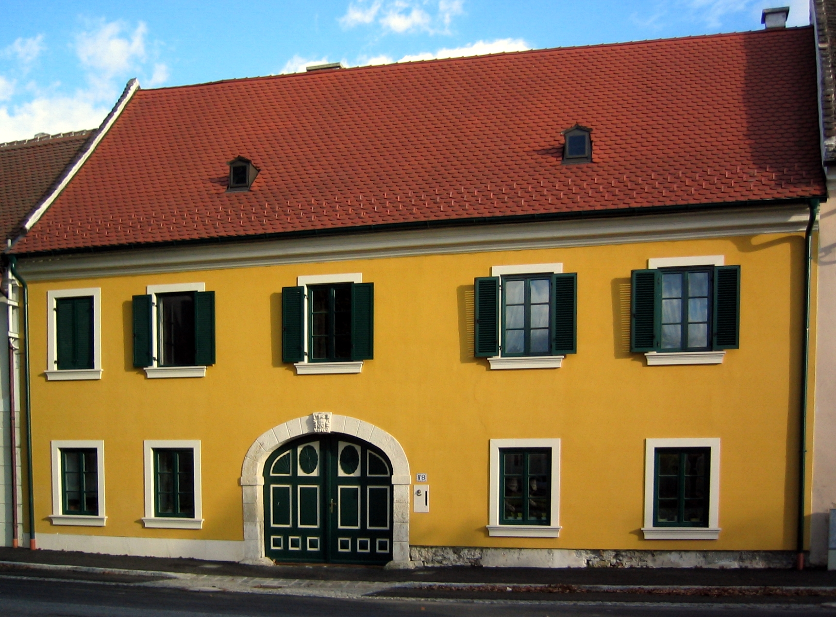 Sitzendorf Hauptplatz 8